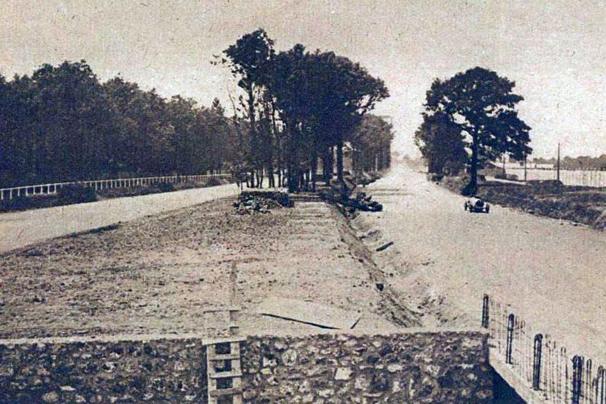 Robert Benoist aux essais du GP de l'A.C.F. 1925 sur l'autodrome de Linas-Monthléry: il quitte la piste de l'autodrome pour s'engager sur la route du circuit.